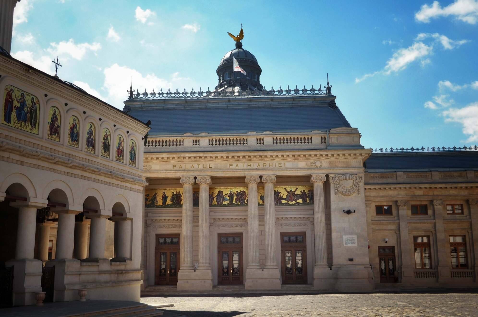 Palatul Camera Deputaților, Bucharest, Romania